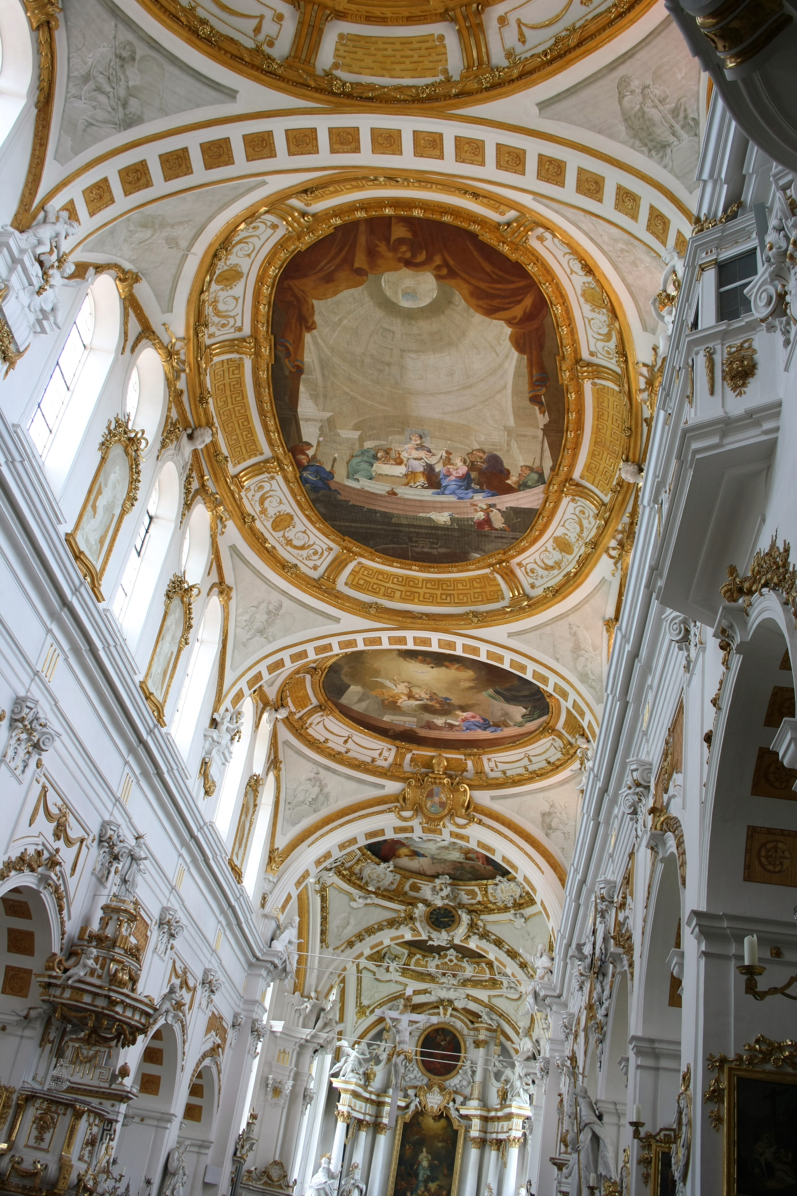 Katholische Pfarr- und Wallfahrtskirche St. Peter und Paul in Oberelchingen, einem Ortsteil von Elchingen im Landkreis Neu-Ulm (Bayern), Mittelschiff